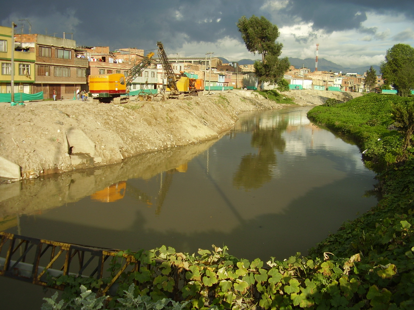 Rio Tunjuelito, sobre la avenida Abastos en Bosa.